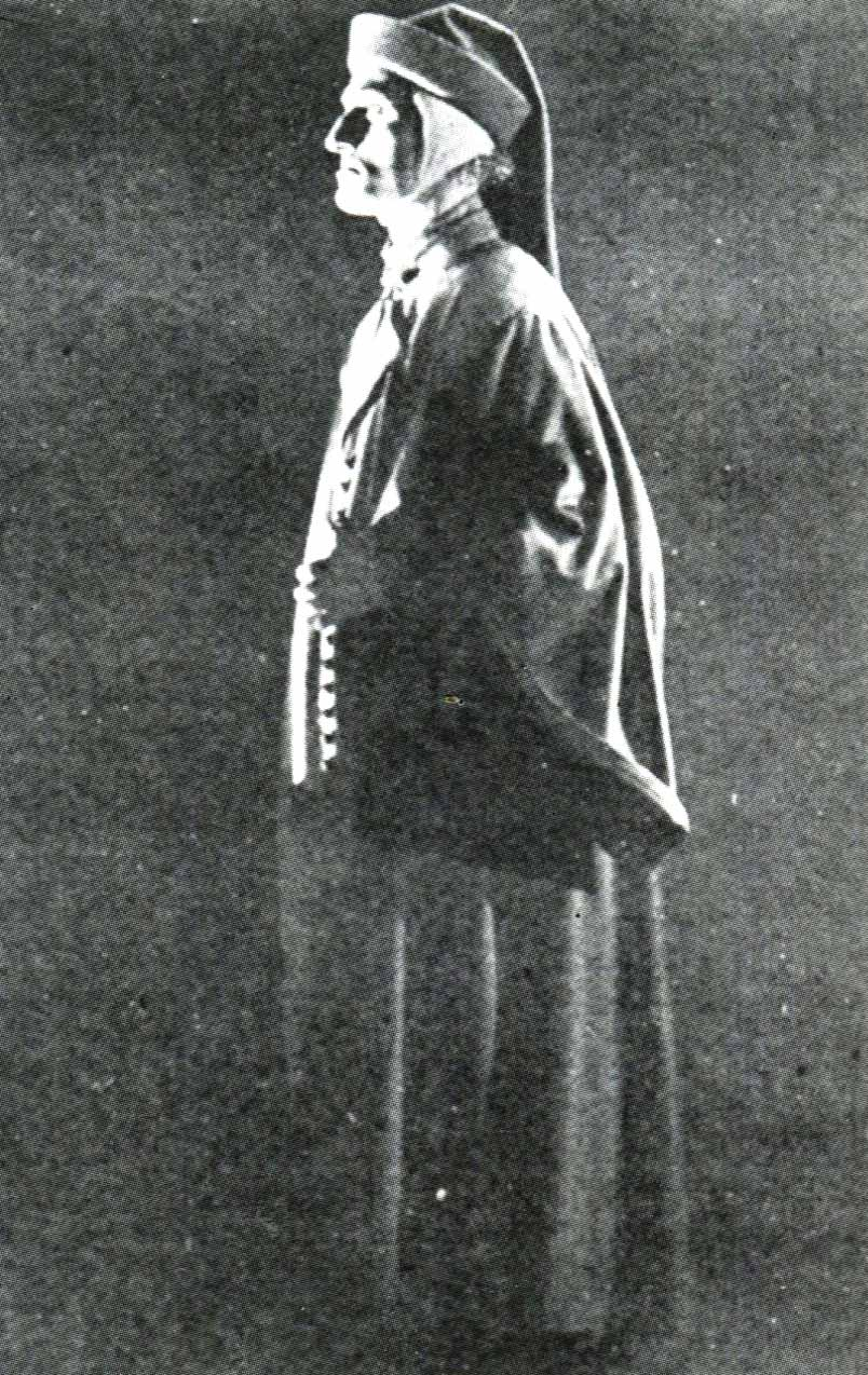 Guido Maraffi impersona Dante Alighieri in Dante nella vita e nei tempi suoi, regia Domenico Gaido - prodz VIS Firenze Rifredi 1922